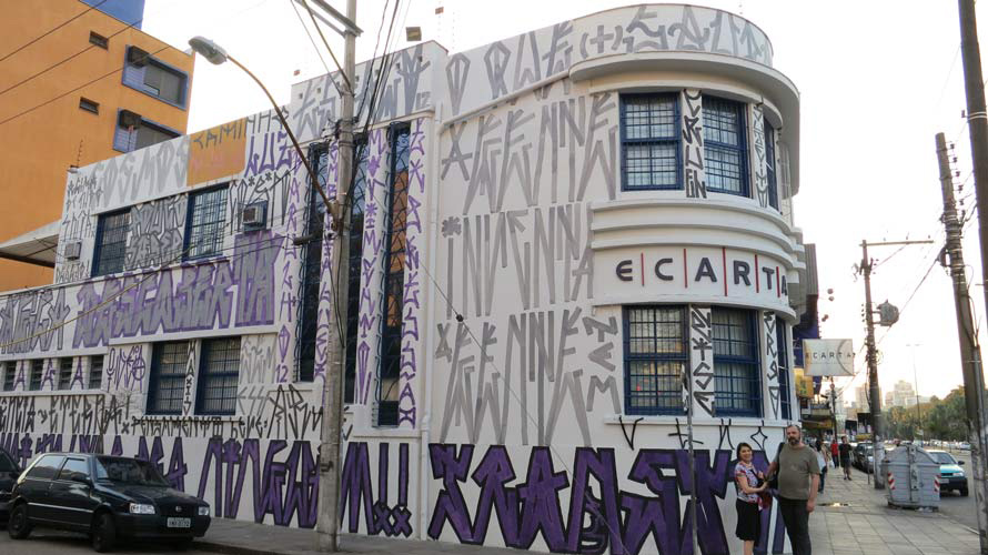 Prédio da Fundação Ecarta com decoração pixada por artistas locais, sob o patrocínio de Leo Felipe, gerente e curador da galeria de arte da Fundação.